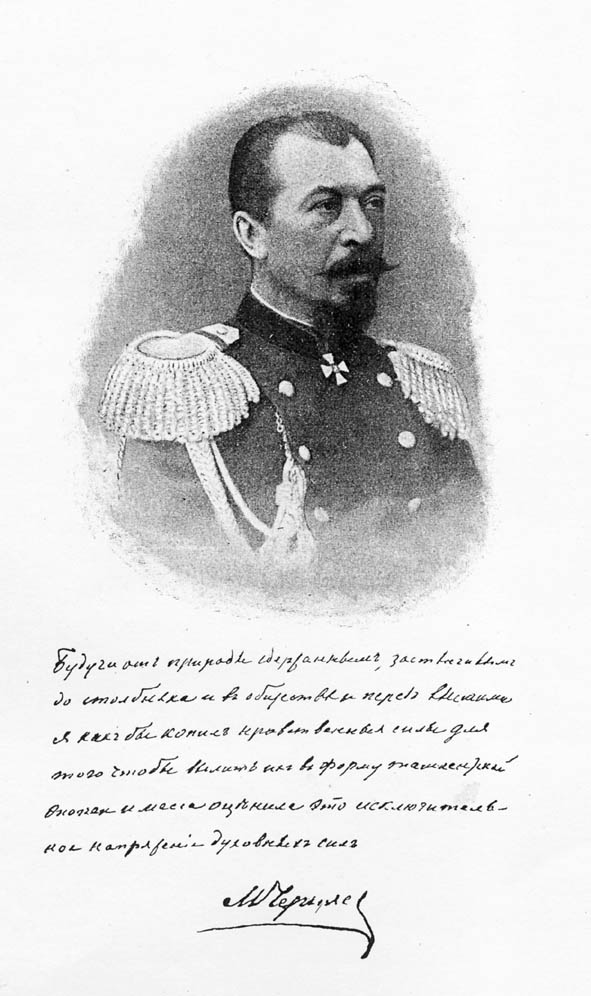 генерал Черняев, Михаил Григорьевич